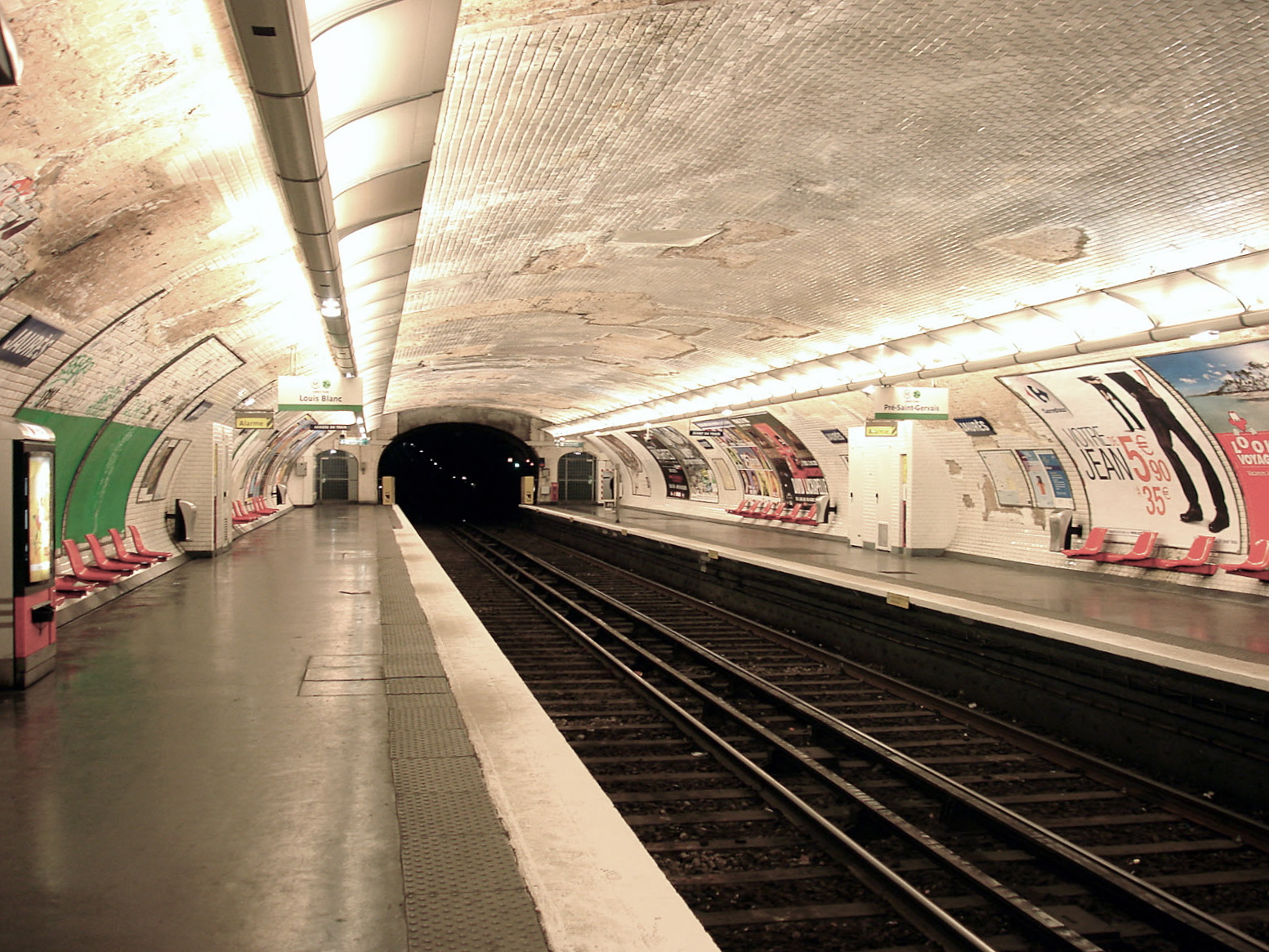 Station Jaurès de la ligne 7 bis du métro de Paris, France.